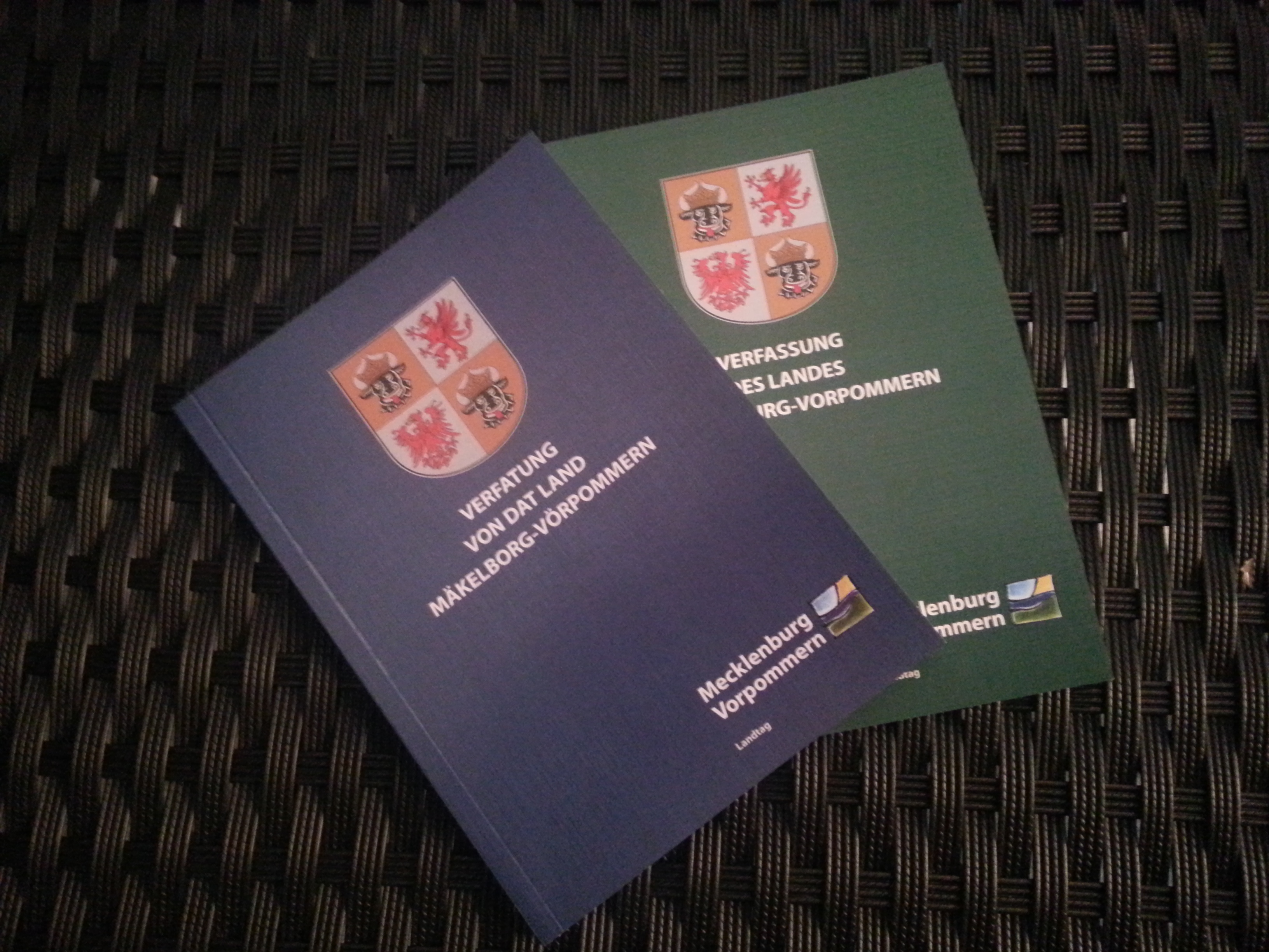 Verfassung des Landes Mecklenburg-Vorpommern in einer deutschen und plattdeutschen Sprachversion.